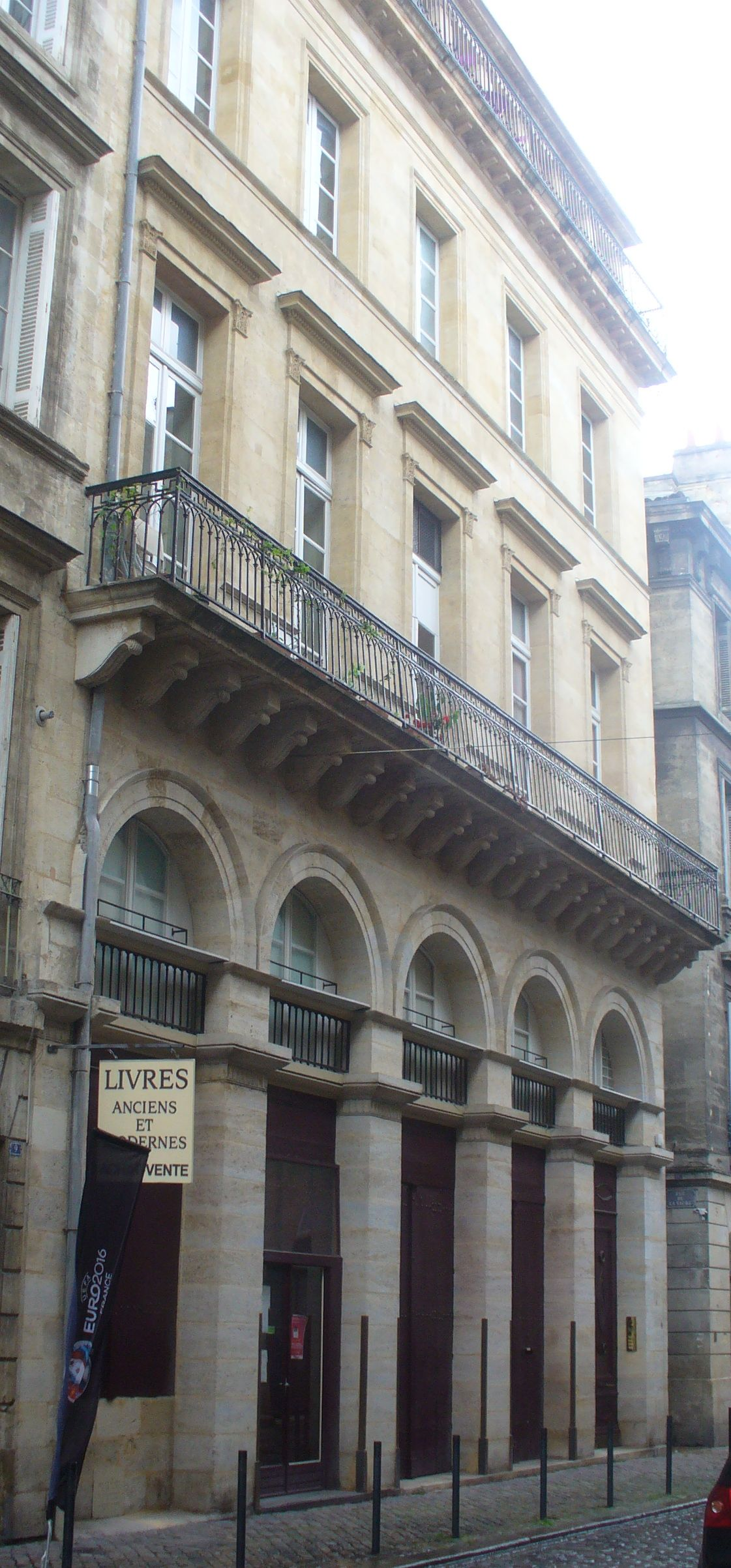 au n°7, rue du Chai-des-Farines à Bordeaux; construit par Jean-Baptiste Thiac, dit le Jeune